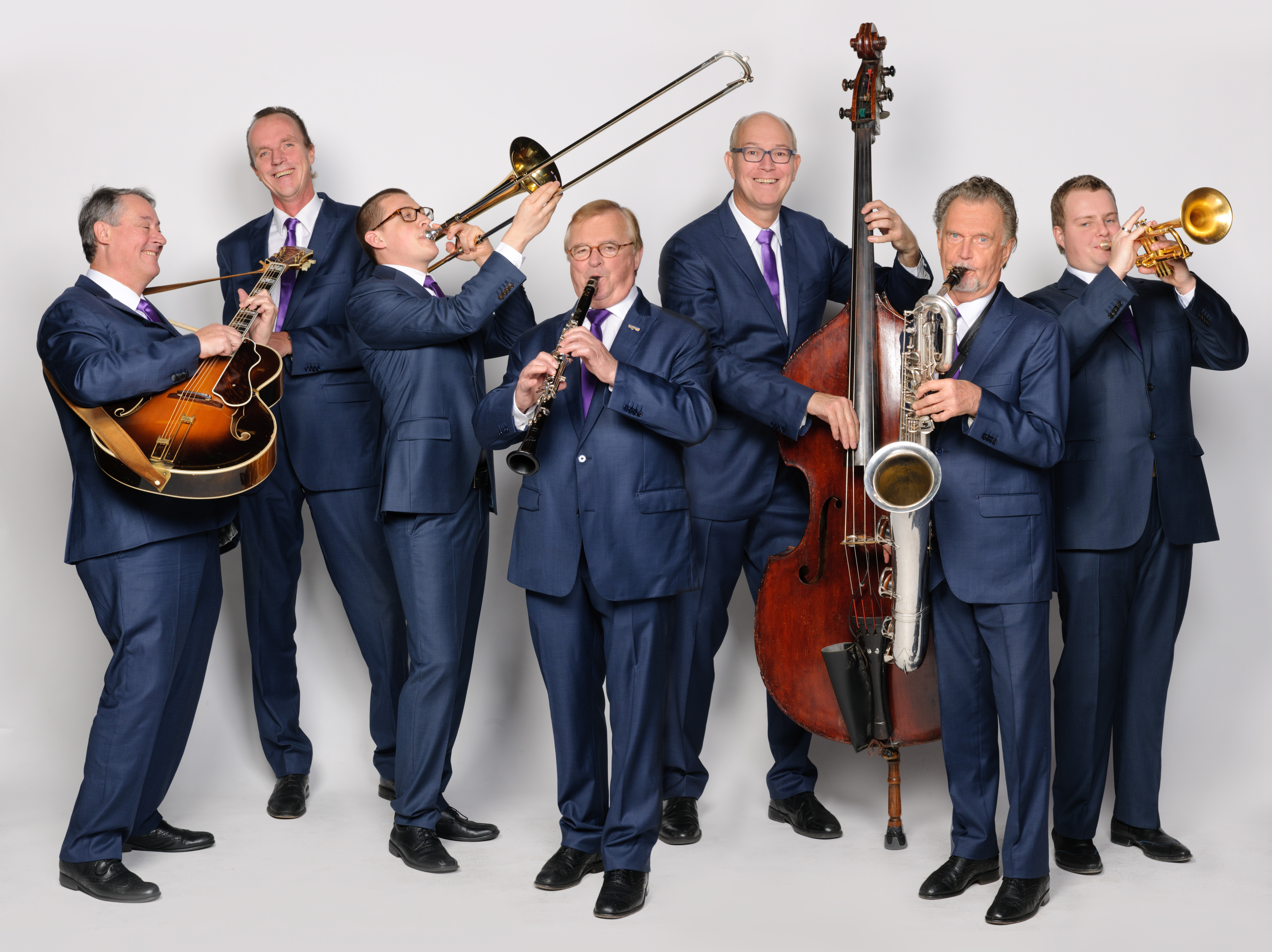 Dutch Swing College Band musicians 2012